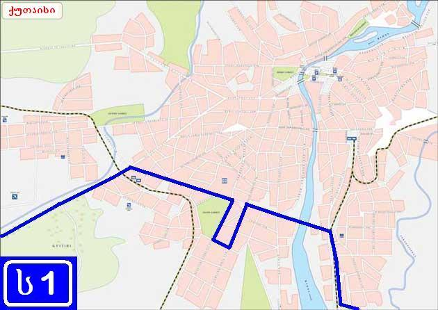 საქართველოს საავტომობილო მაგისტრალი ს1